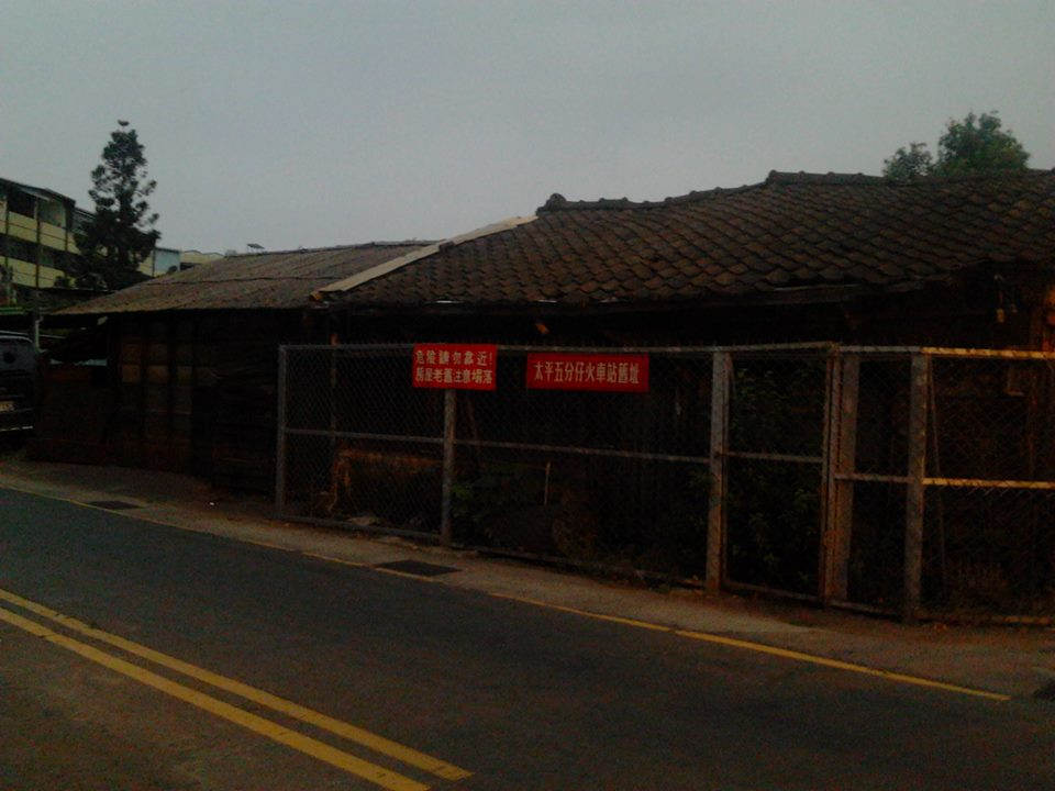 台灣糖業鐵路,中南線,太平車站,拆除前.